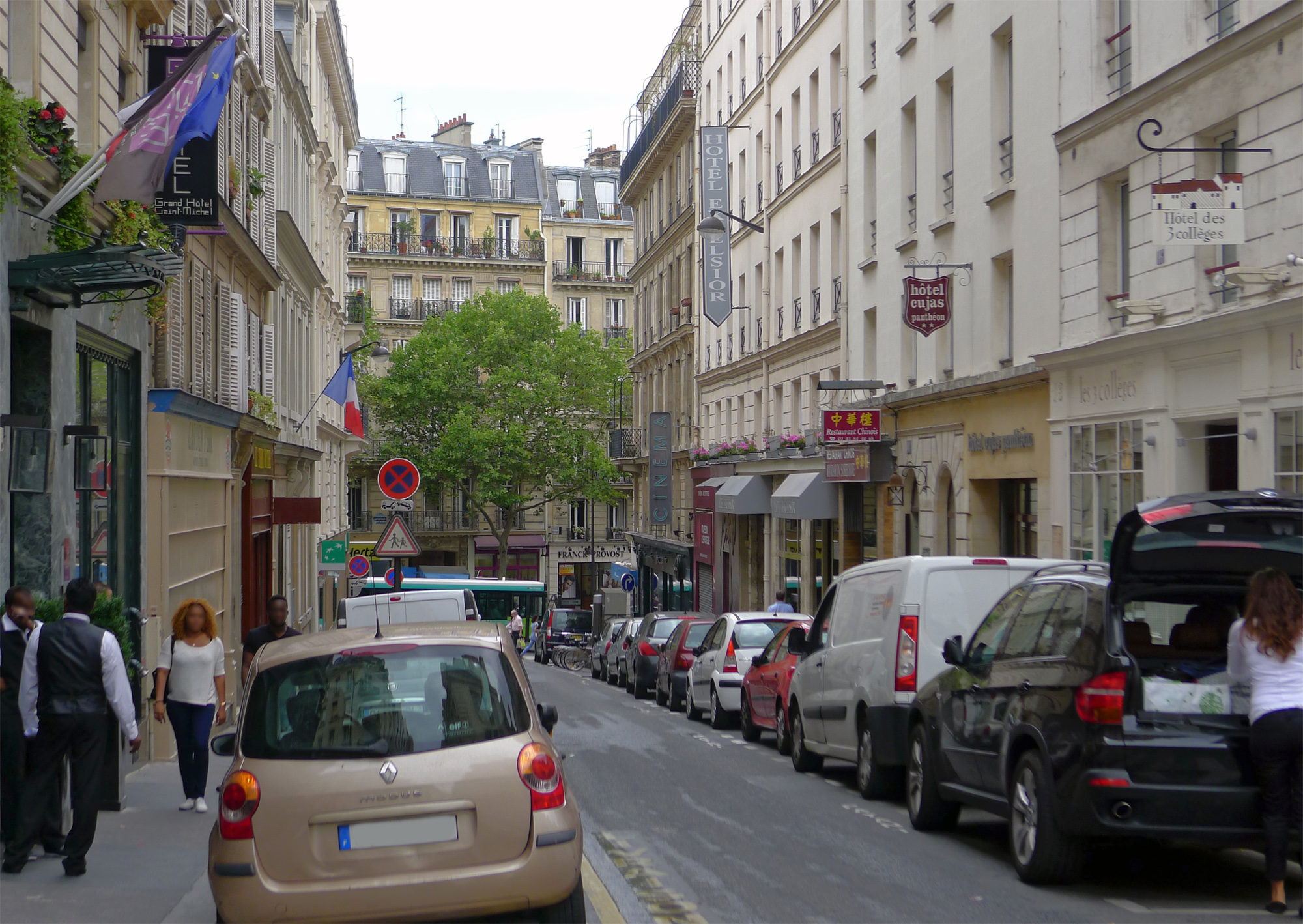 Rue Cujas - Paris V